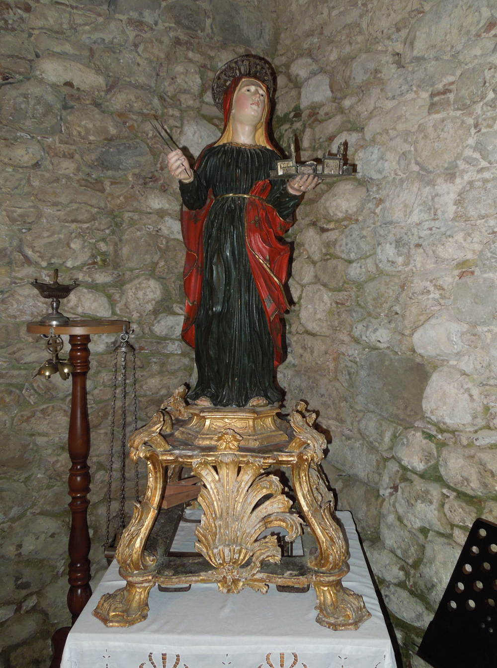 Stauta lignea di Santa Sinforosa. Tossicia in provincia di Teramo, Abruzzo.